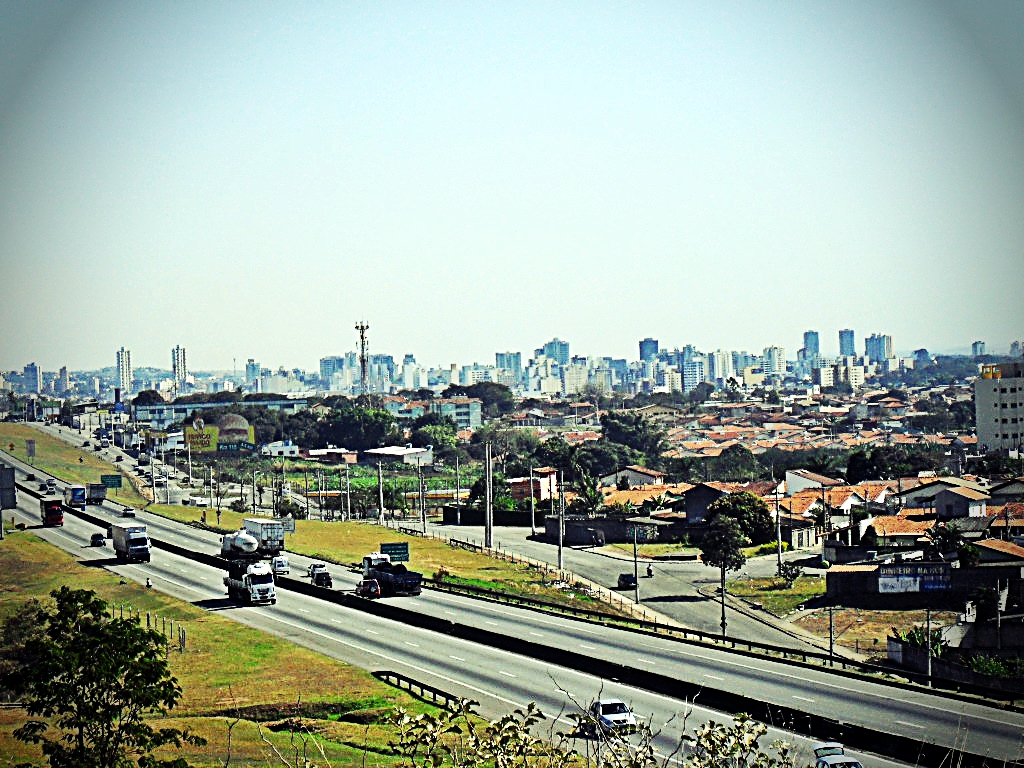 Taubaté, km 105 da Via Dutra